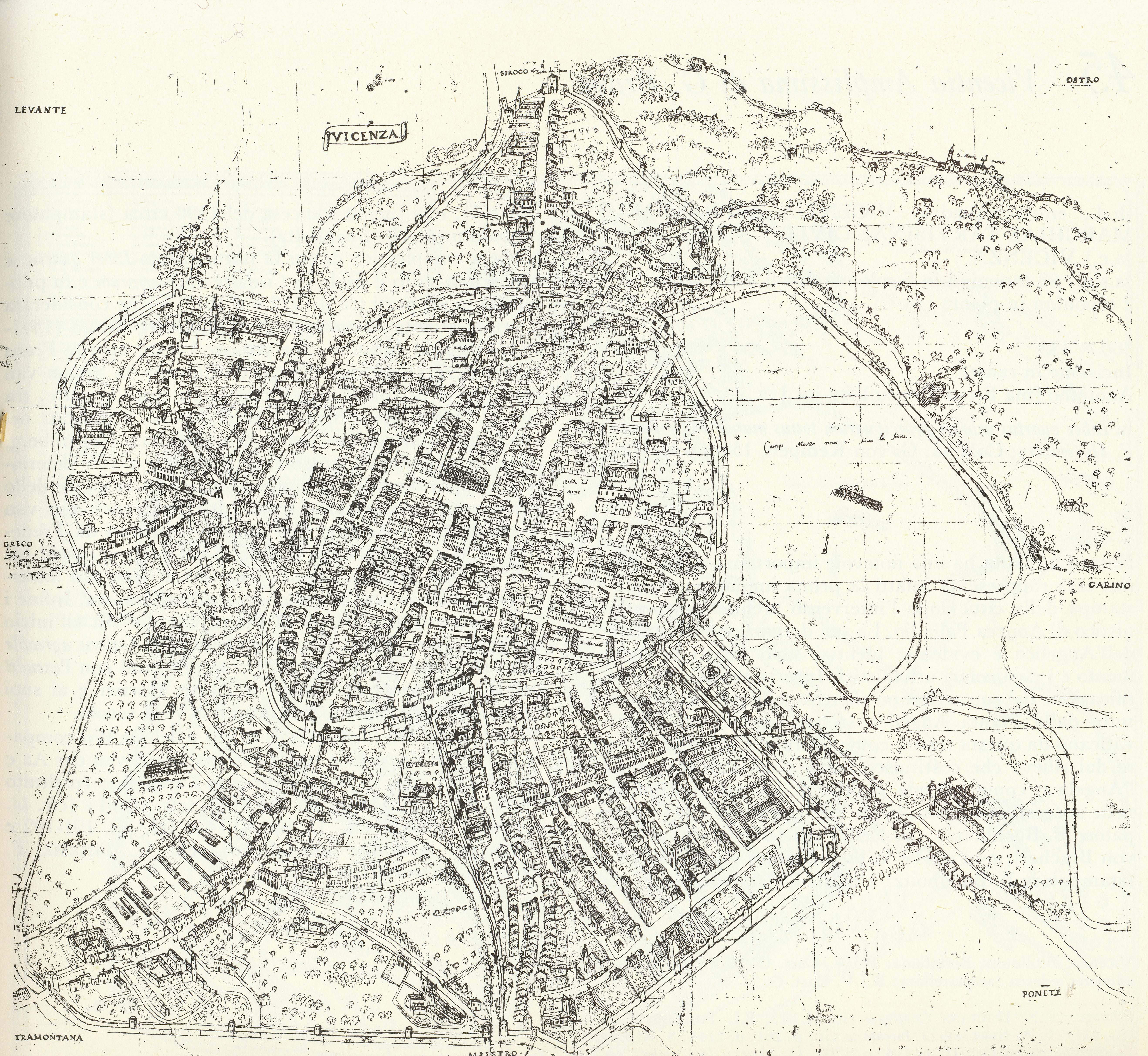 Vicenza - Pianta Angelica 1580, disegnata da G.B. Pittoni (riproduzione b/n)